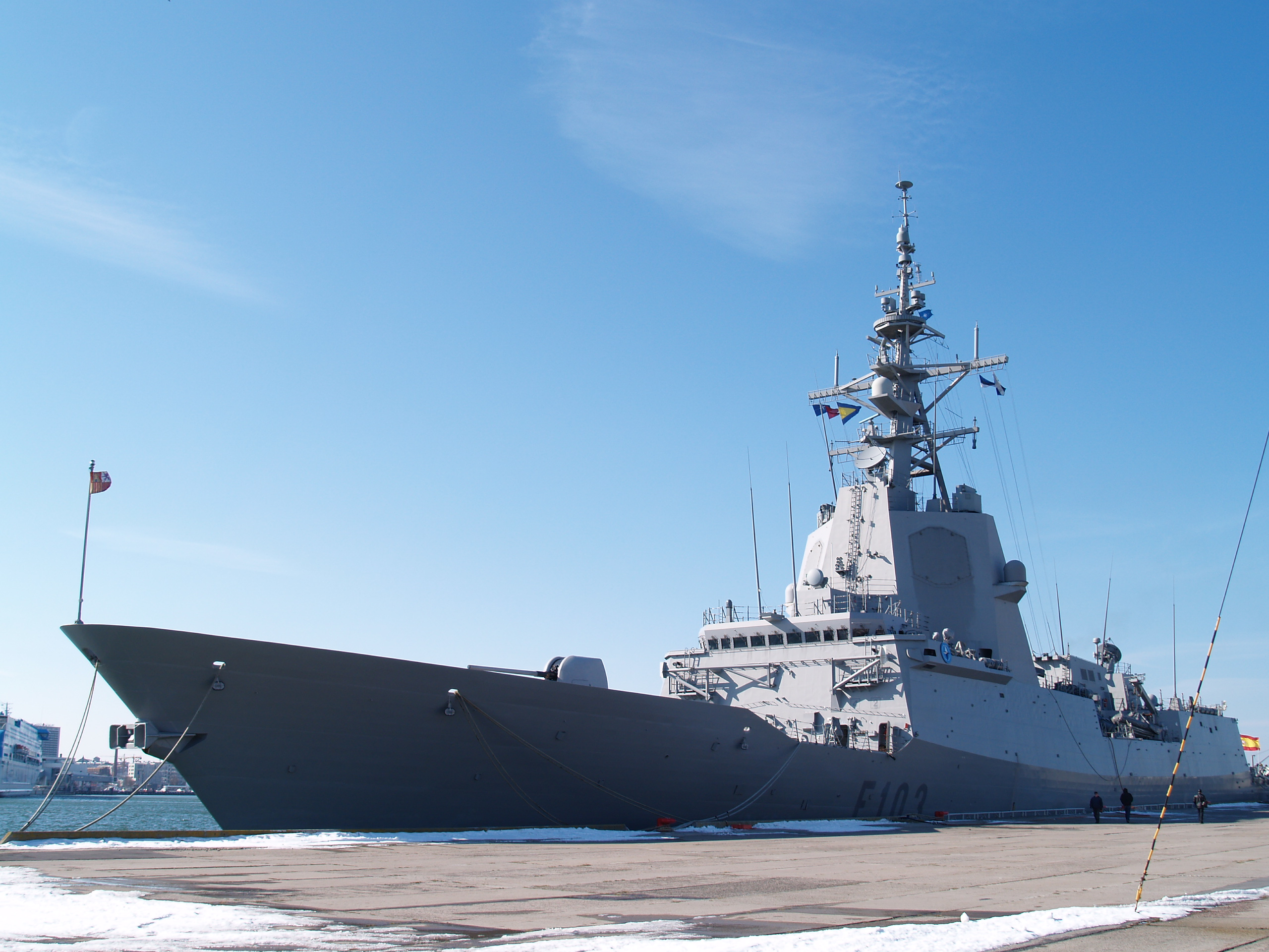 Blas de Lezo (F-103) on it's visit to Tallinn between 27.-31. March 2008.